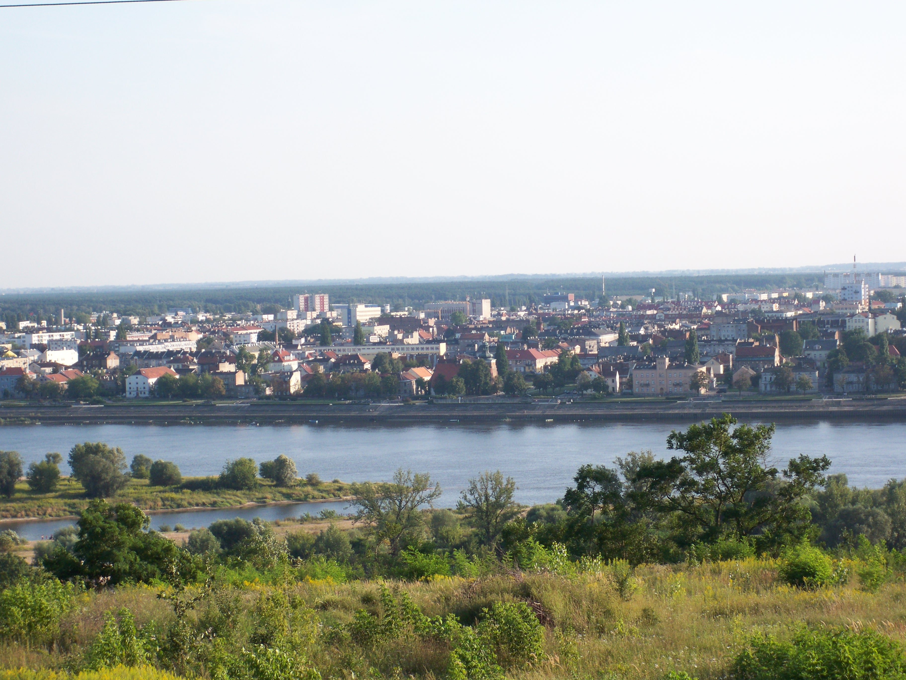 Widok ze Wzgórz Szpetalskich (2009 r.)